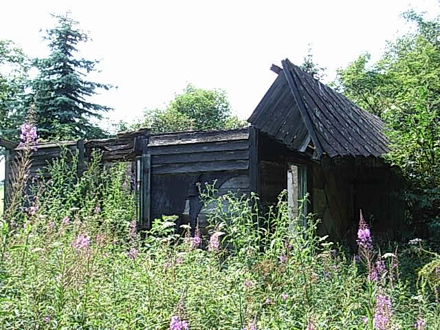 Platz der ehemaligen Gemeinde Grünwald (Pastviny) im Bezirk Teplitz.